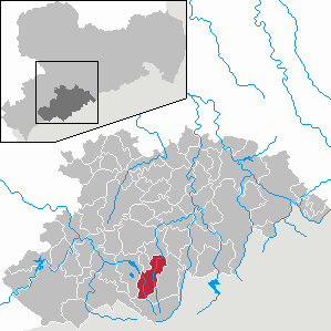 Crottendorf im Erzgebirgskreis, Sachsen